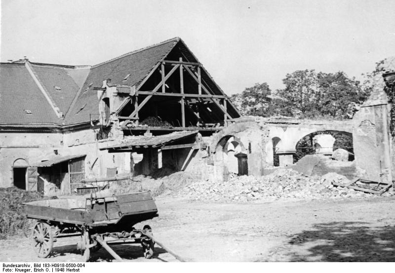 Bei Leipzig, Abbruch des Gutshofes Zentralbild- Erich O. Krueger, 1948, Die Realisierung der Verordnung vom September 1945 über die Durchführung der demokratischen Bodenreform in der Sowjetischen Besatzungszone. U.B.z.: Abbruch des Rittergutshofes Breitenfeld, um Baumaterial für den Aufbau von Neubauernhäusern in der Gemeinde Lindenthal, im Landkreis Leipzig, zu gewinnen. 2202-48